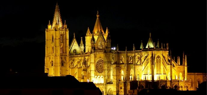 Catedral de León iluminada